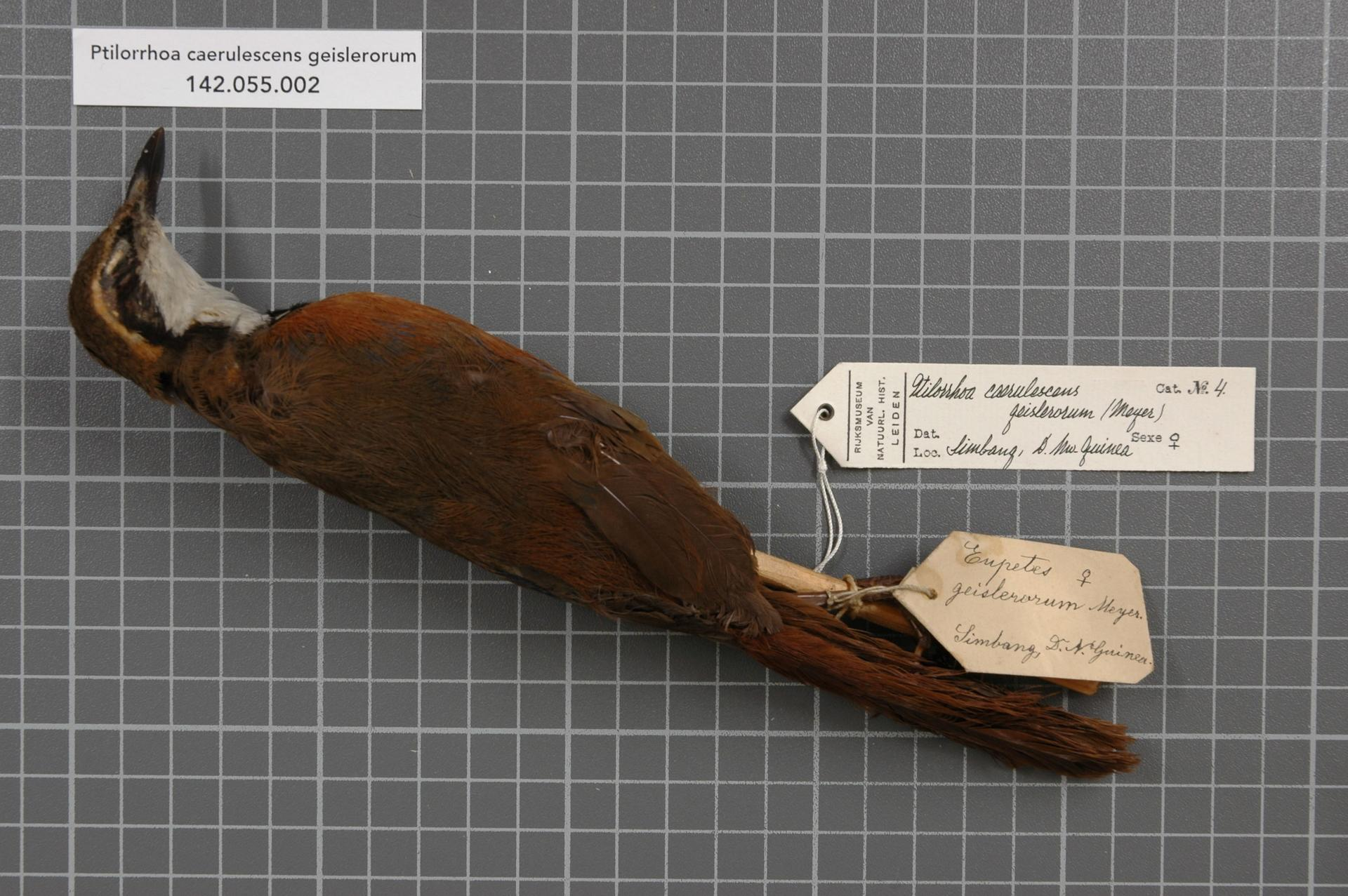 Ptilorrhoa caerulescens geislerorum (Meyer, 1892)